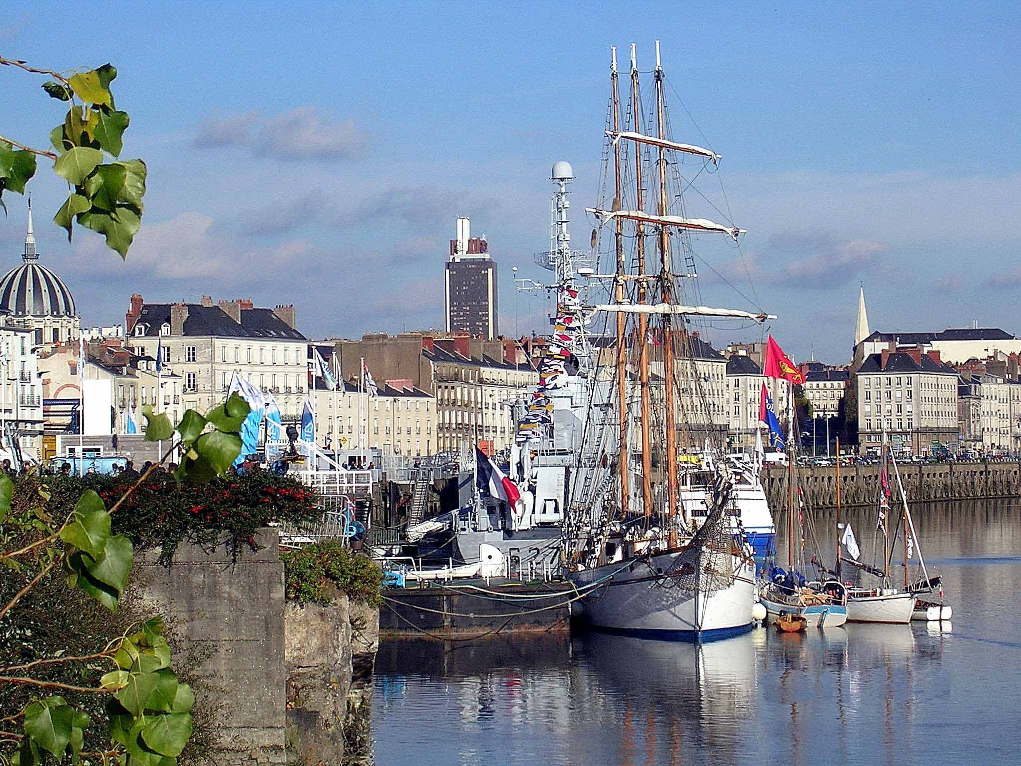 Port de Nantes (escale du Marité quai de la Fosse)